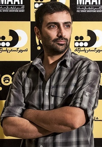 امین زندگانی[ویرایش]